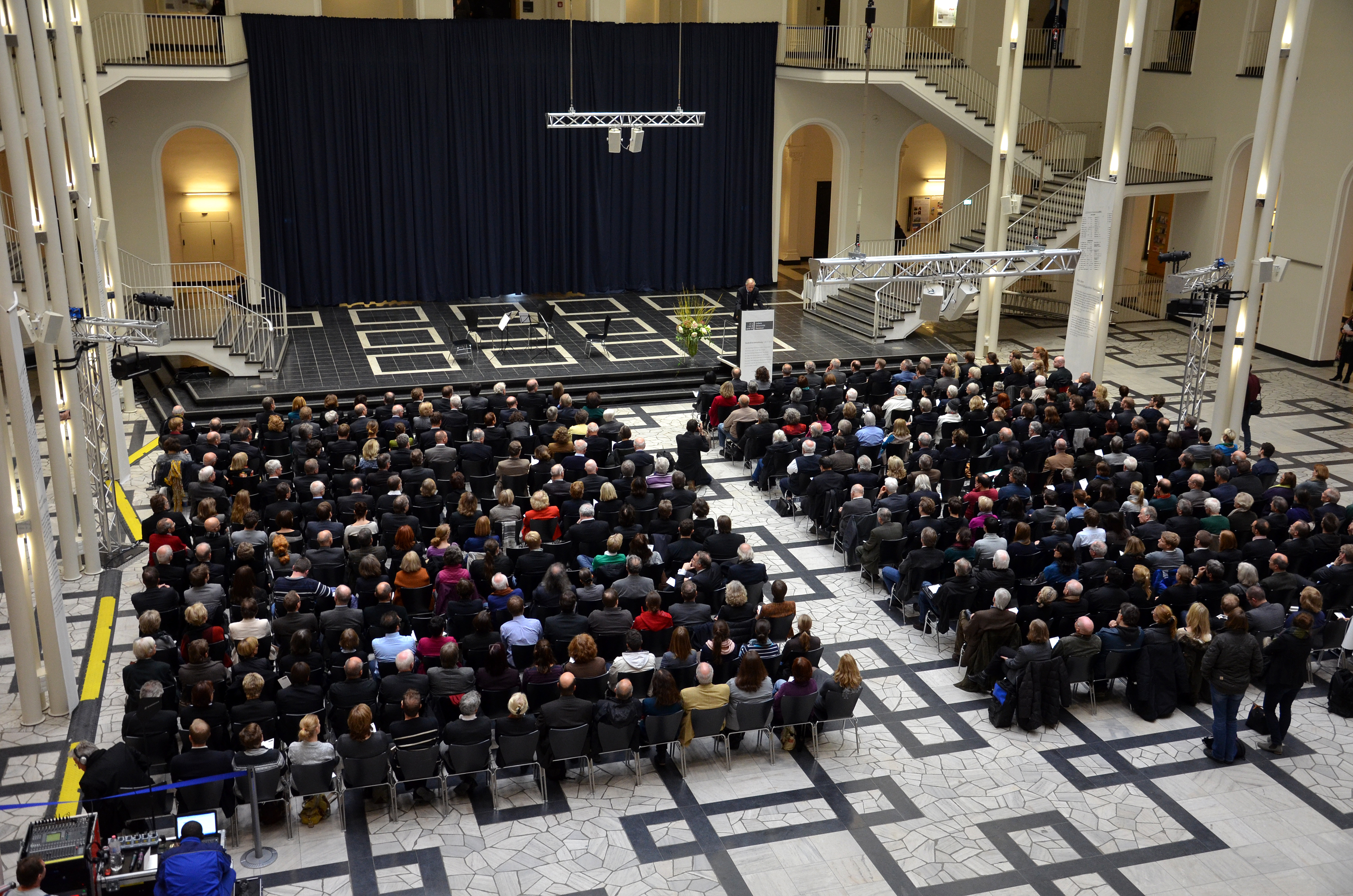 Nach dem Vorspiel des achten Streichquartetts von Schostakowitsch opus 110 in c-Moll, das offiziell "In memoriam den Opfern von Faschismus und Krieg" gewidmet wurde, begrüßte der Präsident der Leibniz Universität Hannover, Erich Barke, im Lichthof des Welfenschlosses die Gäste der Gedenkveranstaltung Verleihung und Entzug von Titeln während der NS-Zeit an der Technischen Hochschule Hannover am 20. November 2013 mit einer Rede ...